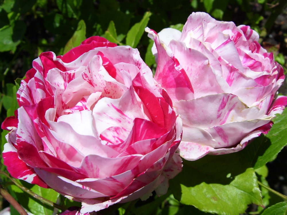 Scentimental Rose Variety